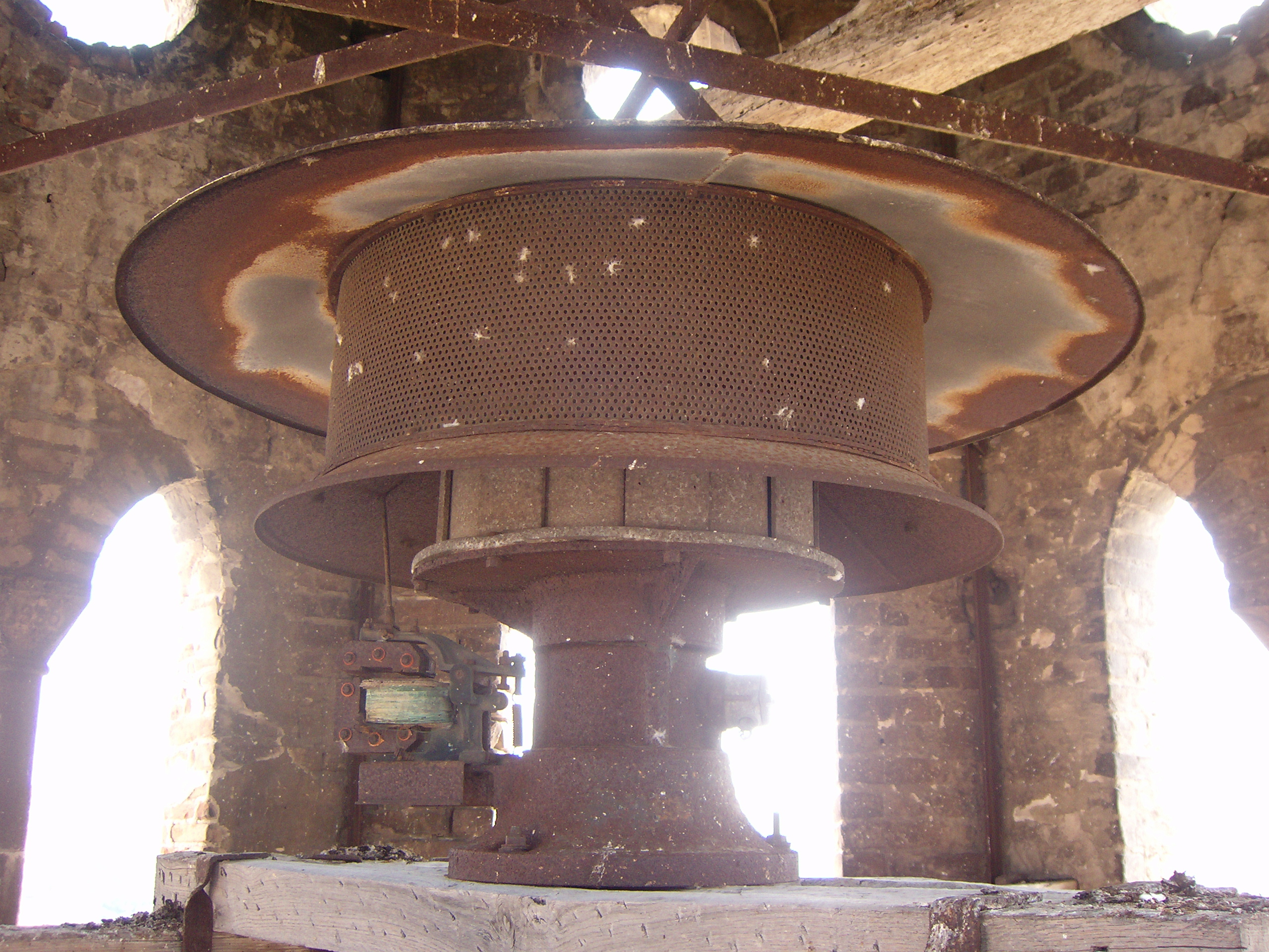 La sirena antiaerea comunale di Teramo come appare oggi